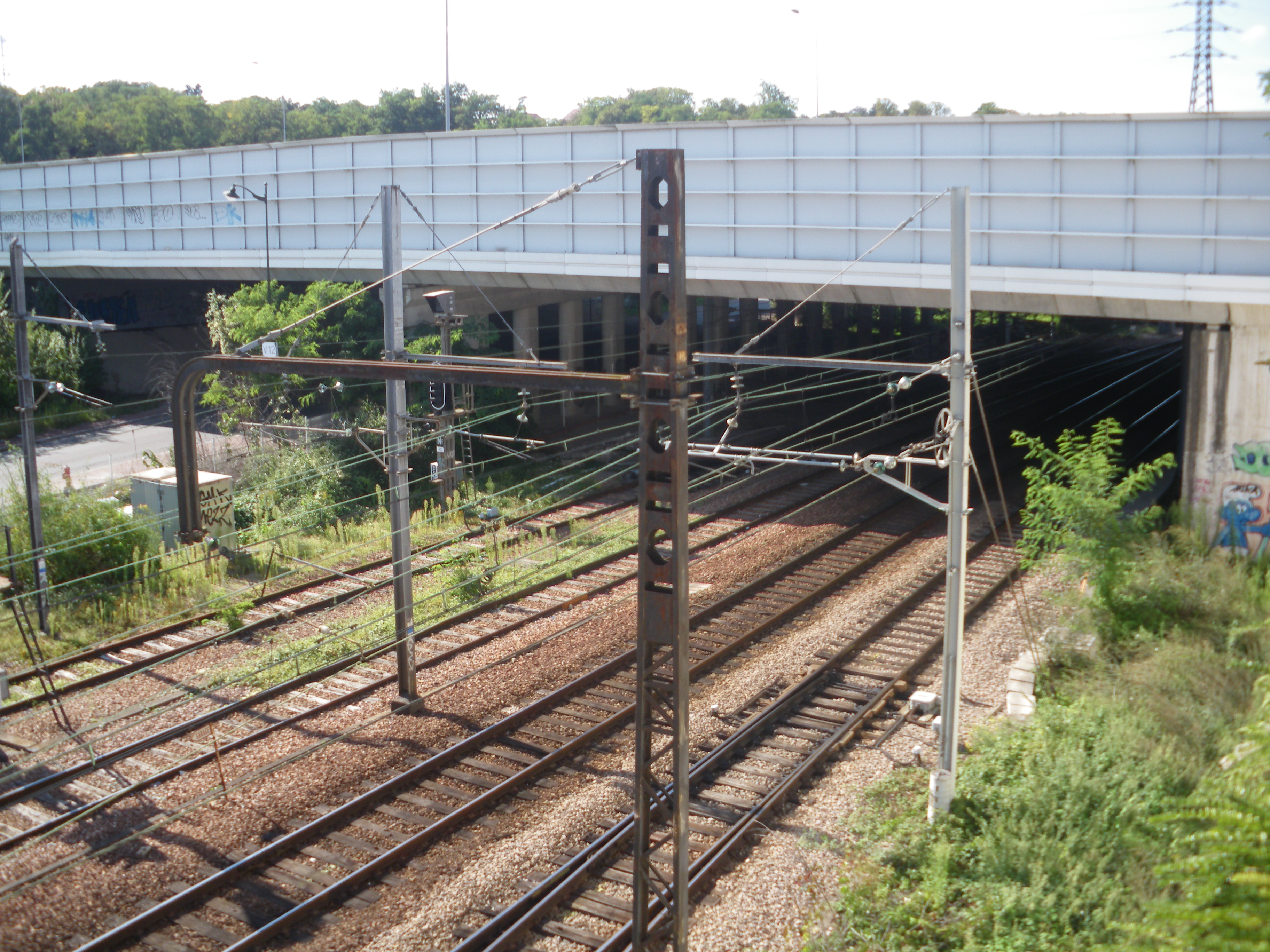 Les voies qu'emprunte les trains "Vallée" de la ligne D du RER au niveau du pont de la N104 (Francilienne), à l'approche de la gare de Corbeil-Essonnes.